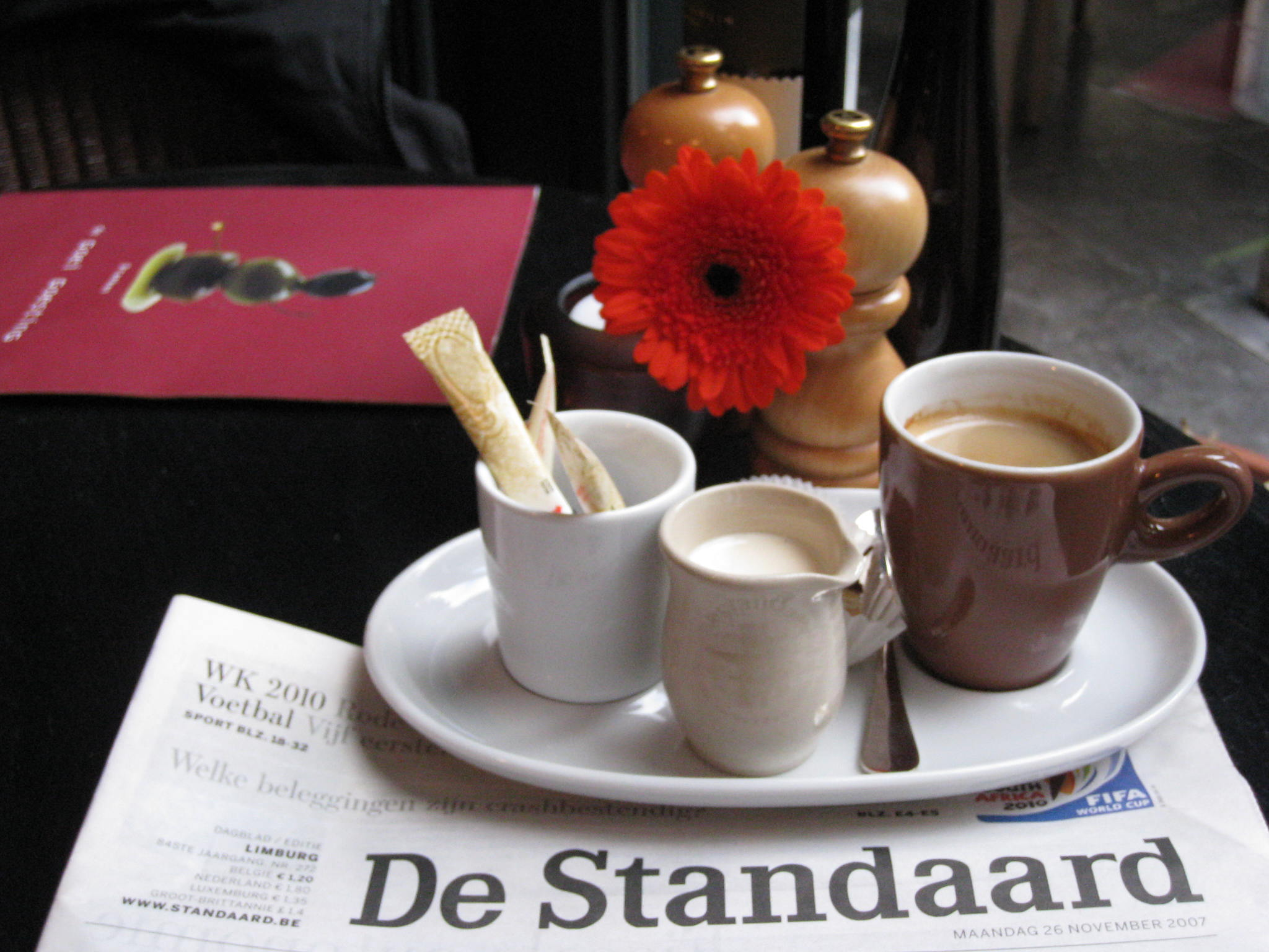 "De Standaard" bij de koffie, 26 november 2007